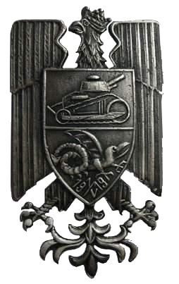 Odznaka pamiątkowa 1 Pułku Czołgów Armii Polskiej we Francji gen. Józefa Hallera. Pułk ten był pierwszą polską jednostką pancerną, powstałą 15 marca 1919 we Francji w oparciu o francuski 505 pułk czołgów. Pułk otrzymał odznakę pamiątkową w 1920 roku zatwierdzoną Dz. Rozk. MSWojsk nr 49 z 1921. Odznaka ma wymiary 30 x 55 mm, jest posrebrzana i oksydowana, umocowana na śrubce z nakrętką.